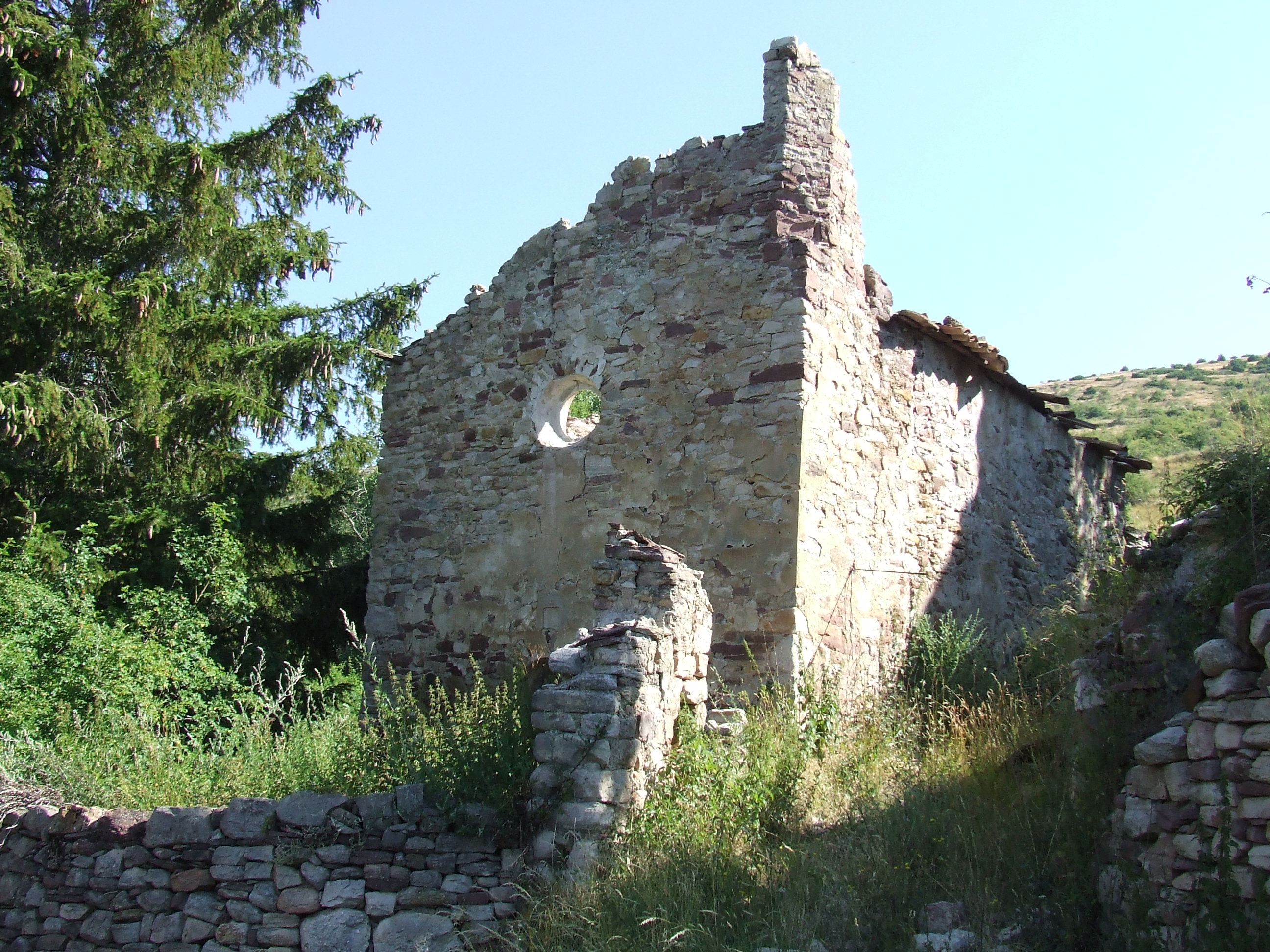 L'església de la Nativitat de la Mare de Déu de Larén (Senterada, Pallars Jussà)